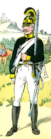 Chevauxlegers/Dragoner des Regiments Levenehr